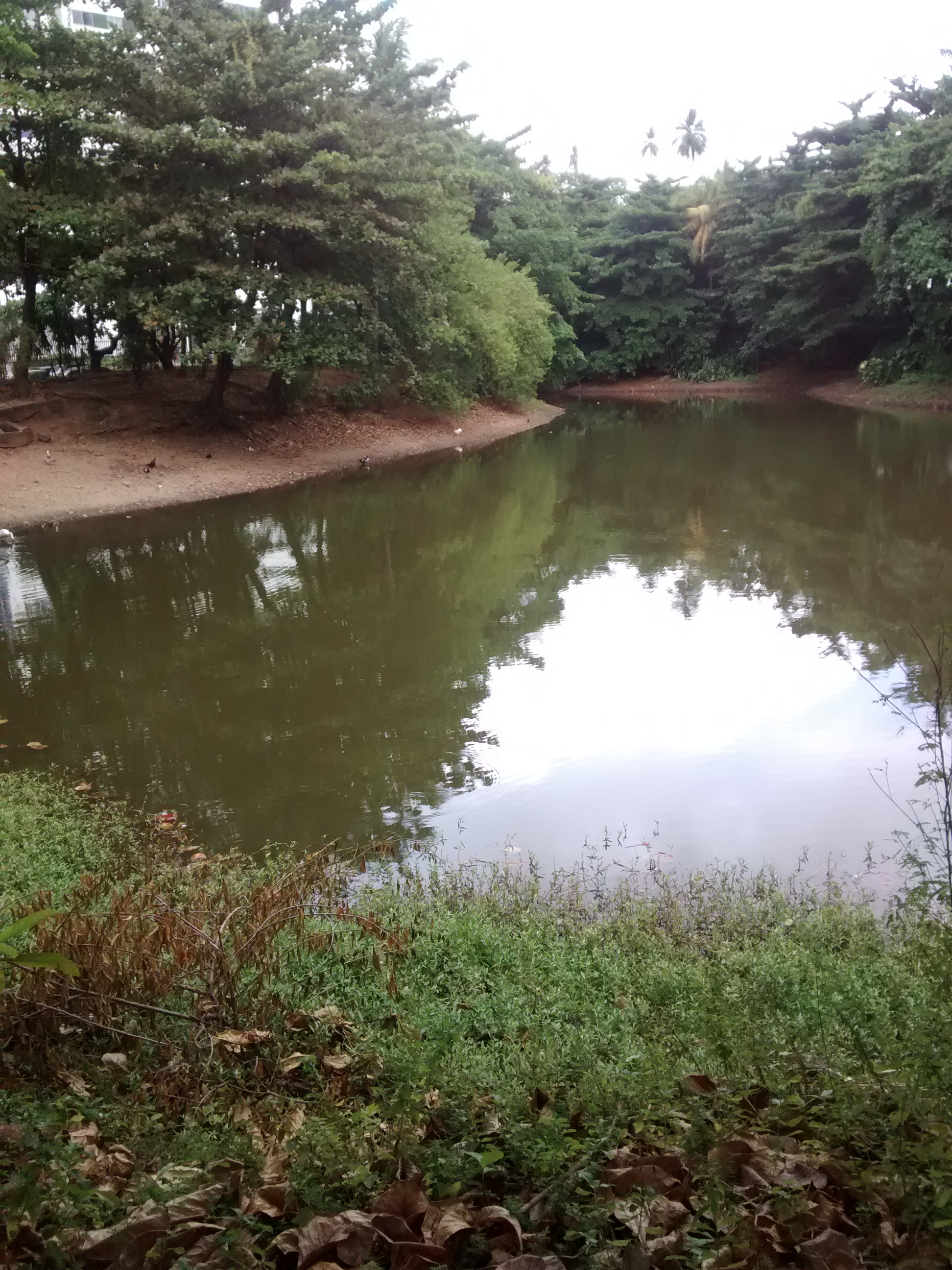 Lagoa dos Patos, parque localizado no bairro da Pituba, em Salvador-BA